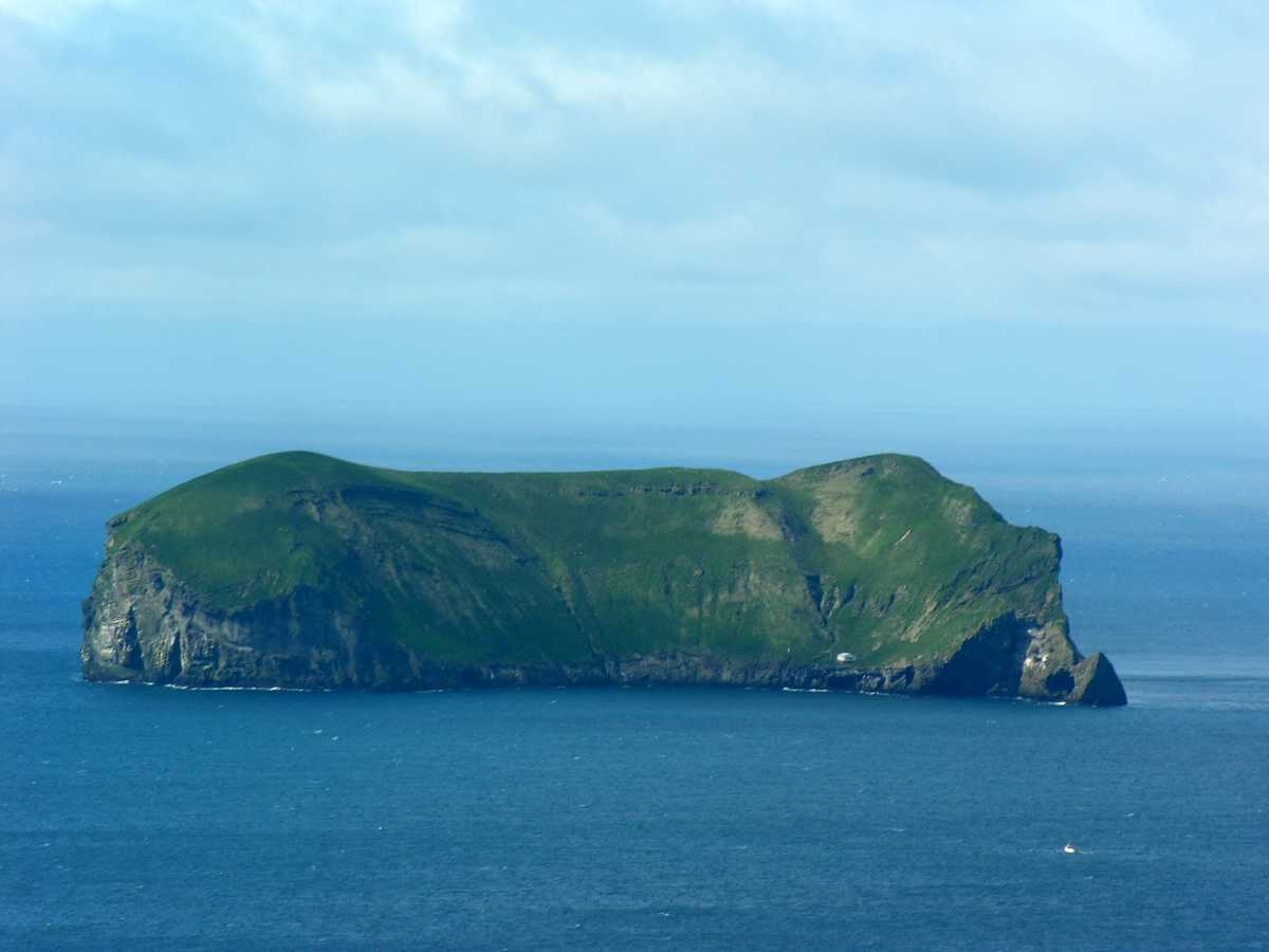 Iceland, Vestmannaeyjar